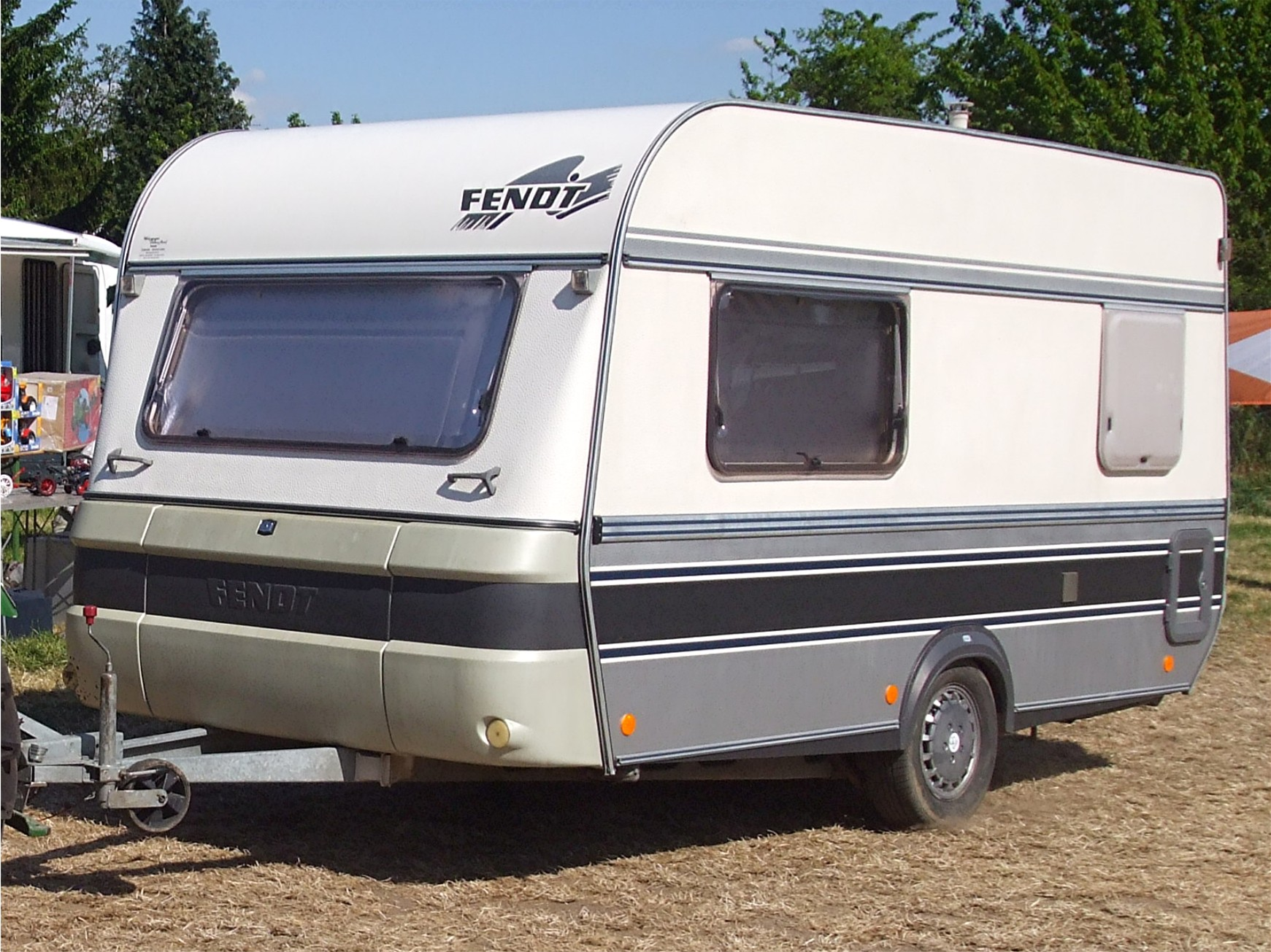 Einachsiger Fendt-Wohnwagen „Diamant“